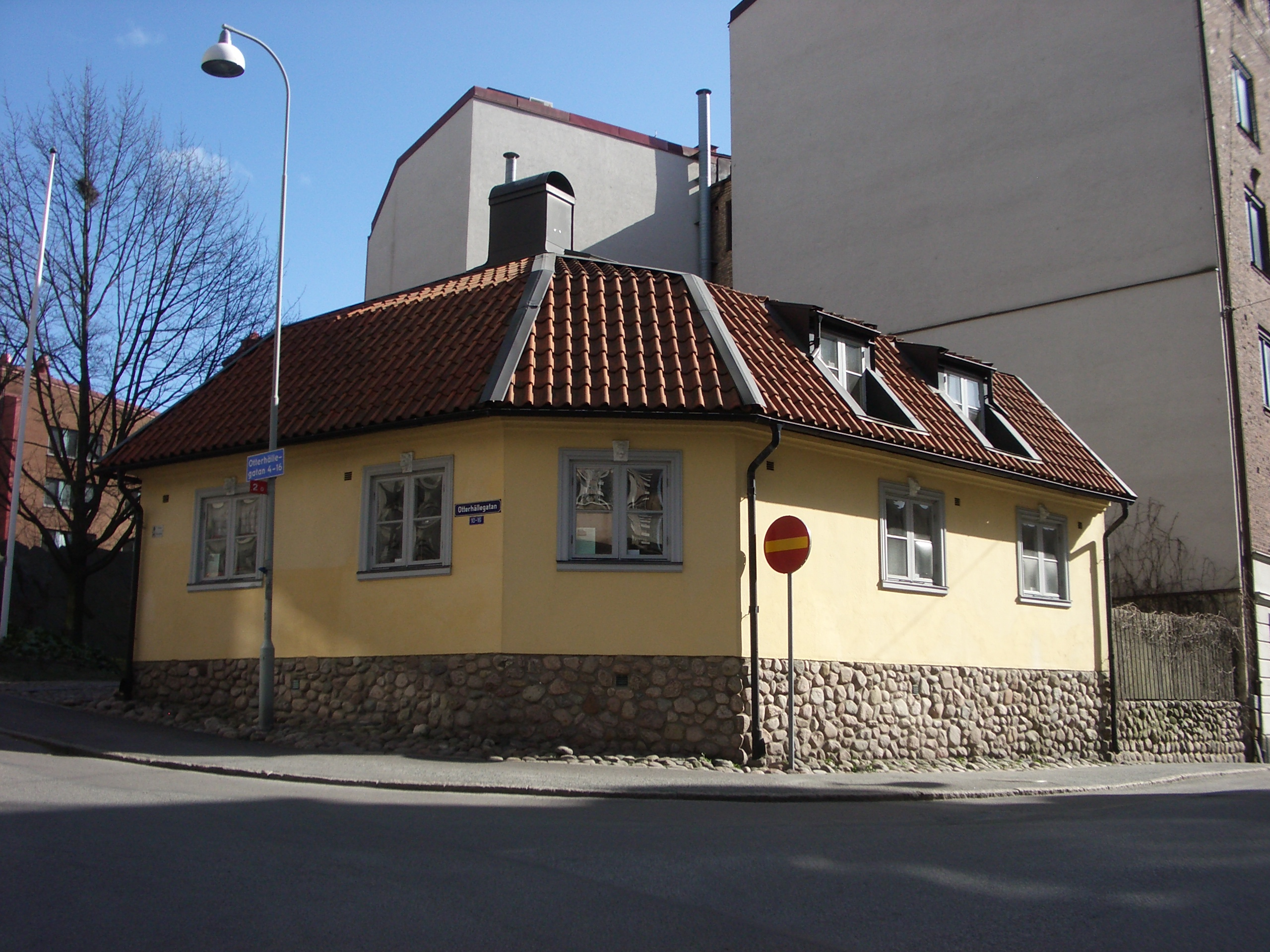 Drottning Kristinas Jaktslott sett från korsningen Västra Liden och Otterhällegatan.